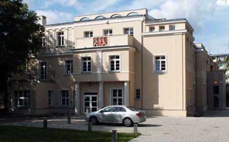 Budynek Szkoły Muzycznej II st. im. Fryderyka Chopina w Gdańsku-Wrzeszczu, ul. Partyzantów 21a